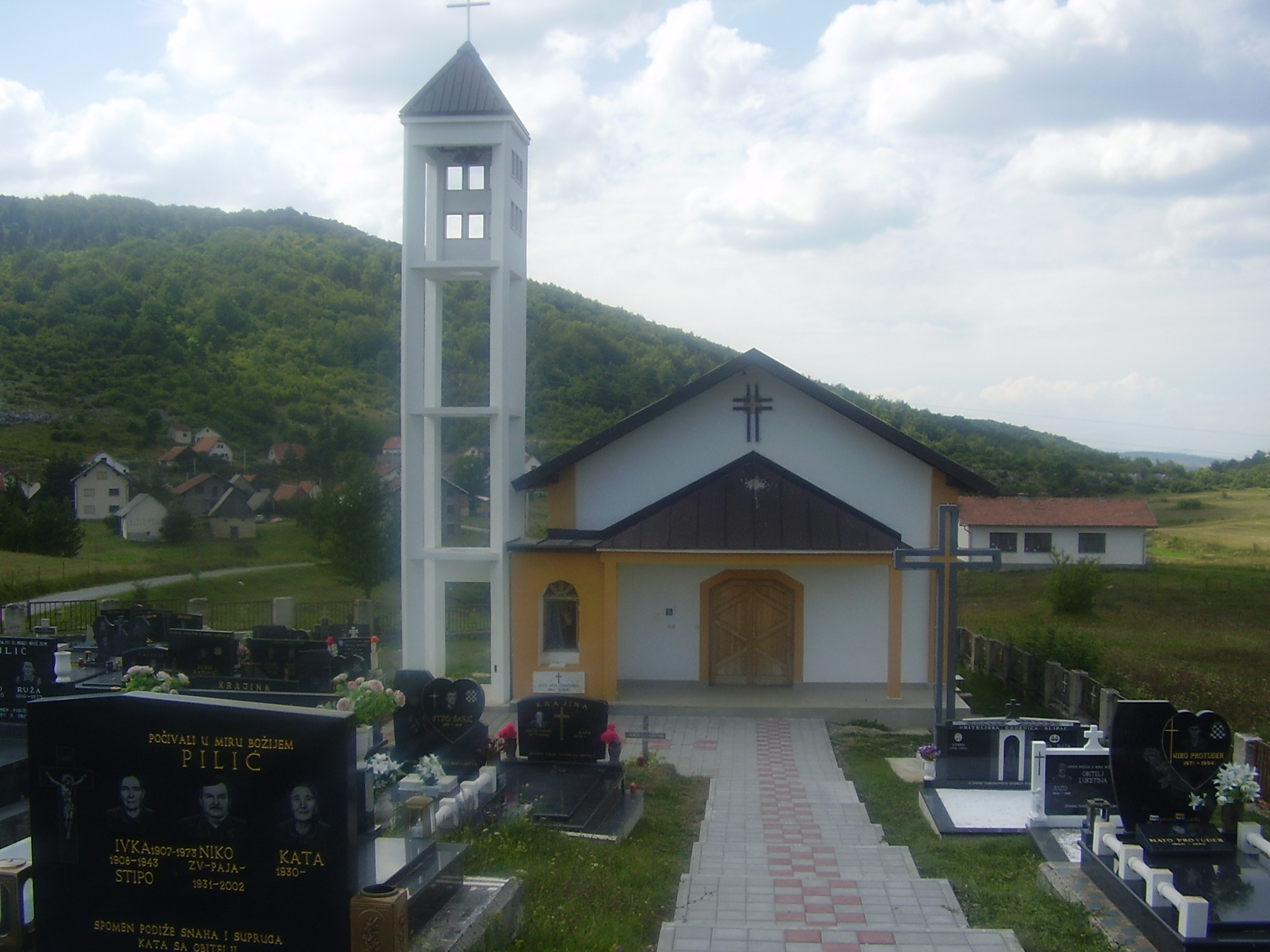 Crkva i groblje na Pidrišu, Uskoplje